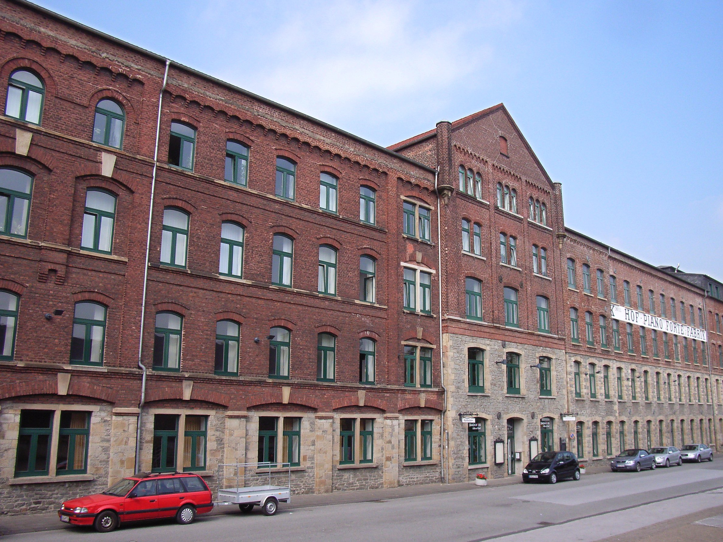 Fabrikgebäude des Klavierherstellers Rud. Ibach Sohn an der Wilhelmstraße in Schwelm